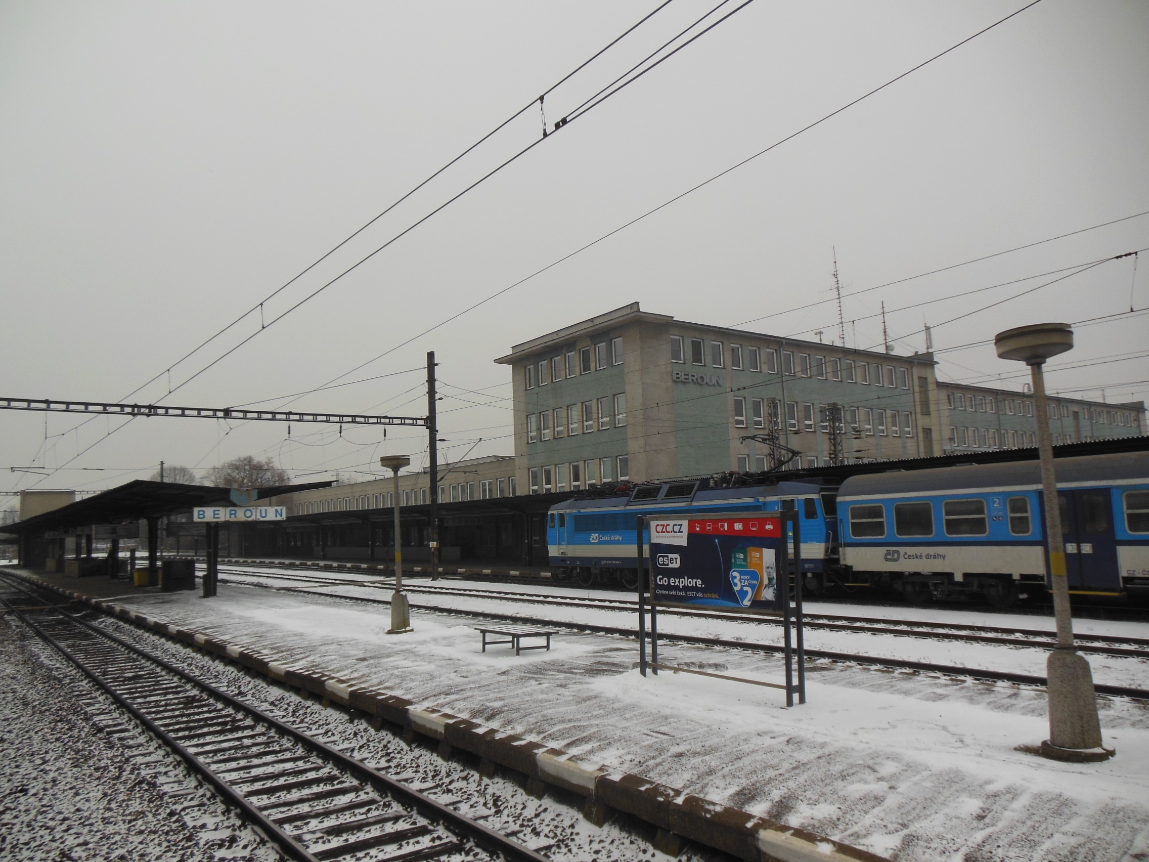 Nádraží v ulici U Nádraží v Berouně.